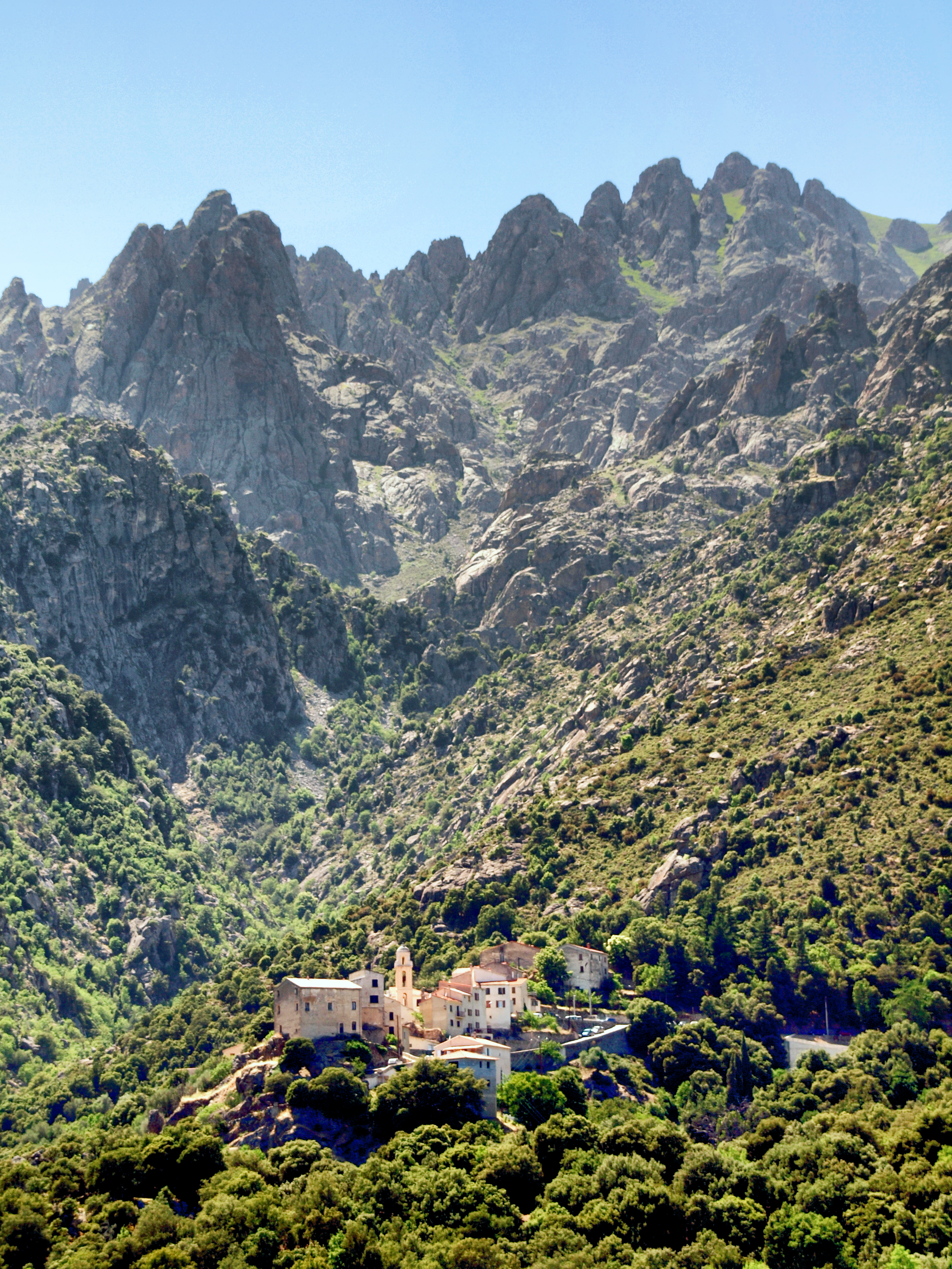 Castiglione, Giovellina (Corse) - Le village de Castiglione au pied des Aiguilles... de Popolasca.